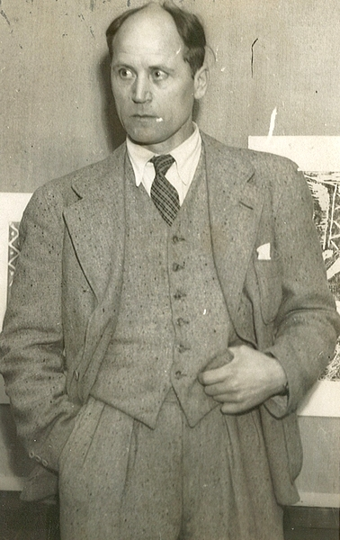 portrett, mann, kunstmaler, stående halvfigur.